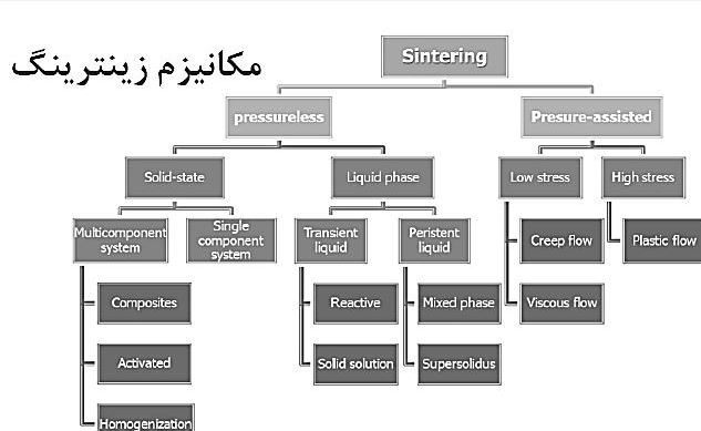 مکانیزم